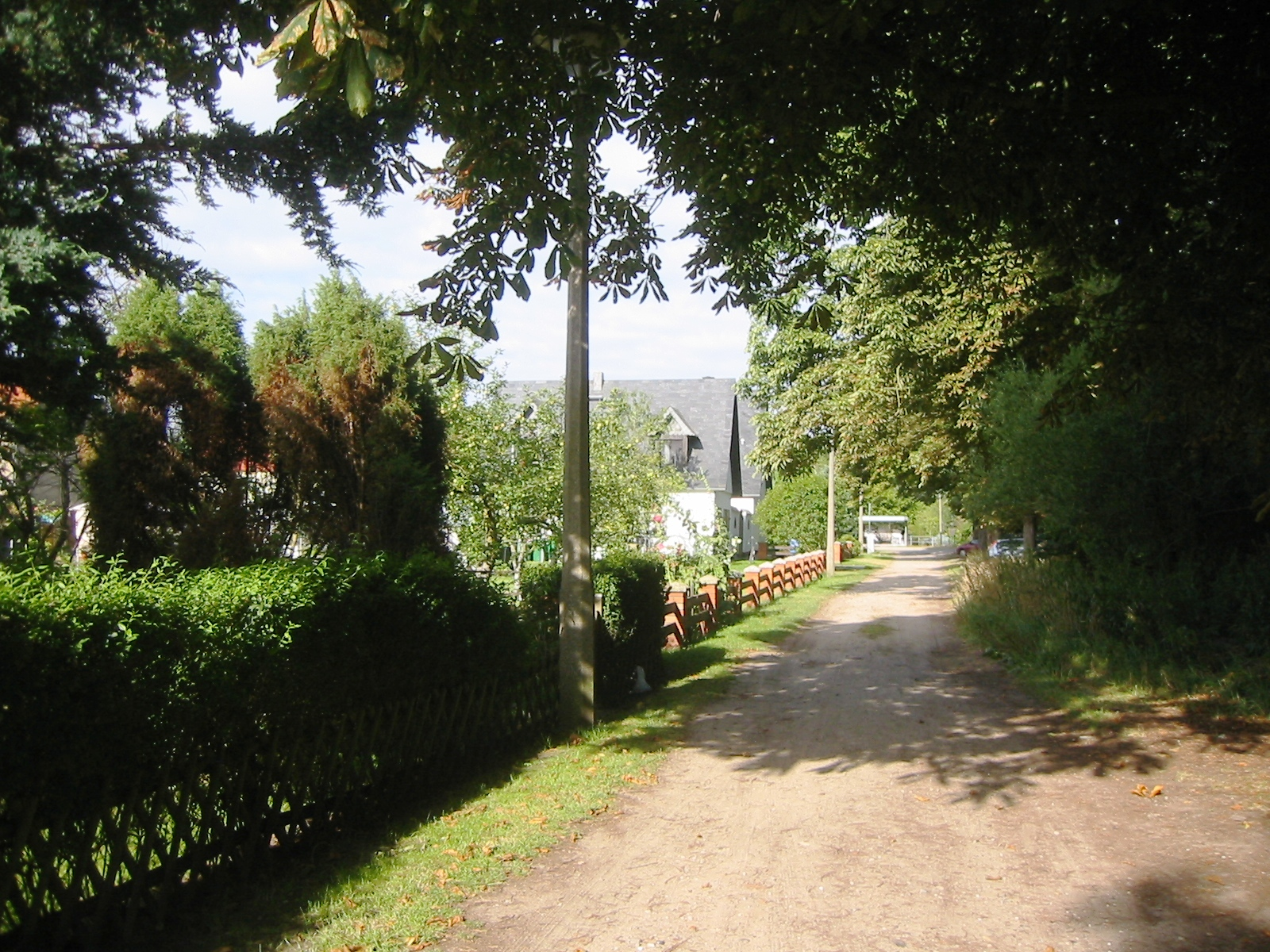 Zufahrt zum Haltepunkt "Torfbrücke" im gleichnamigen Ortsteil von Rostock